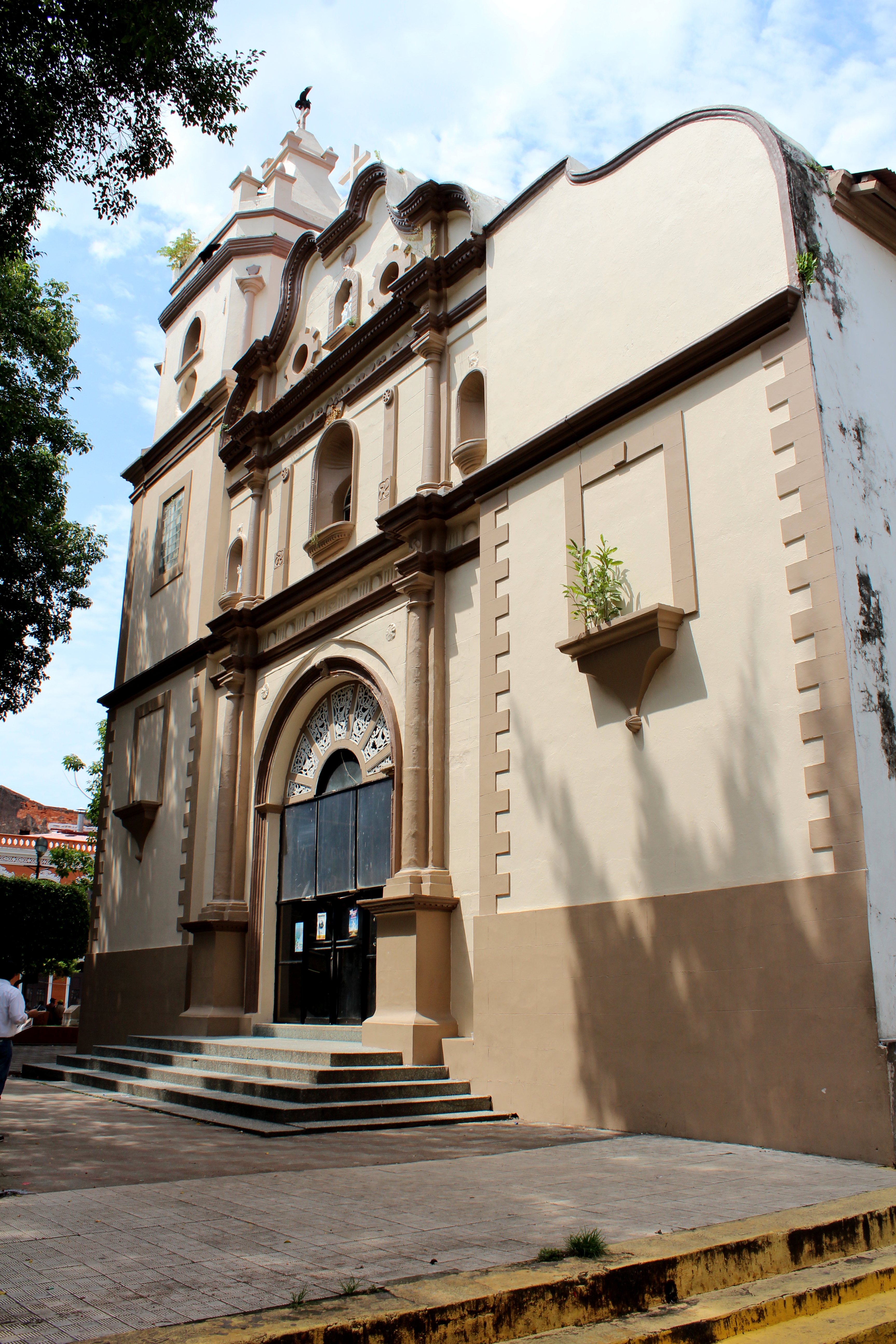 a la fotografia se le retoco el brillo y el contraste